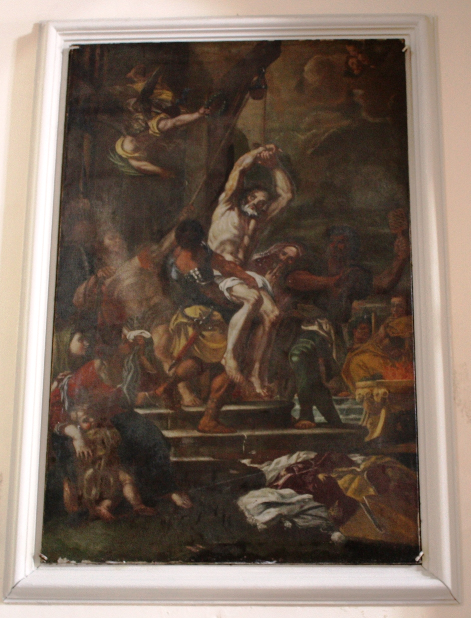 Dipinto del Martirio di San Biagio nella chiesa dell'Addolorata a Maratea.